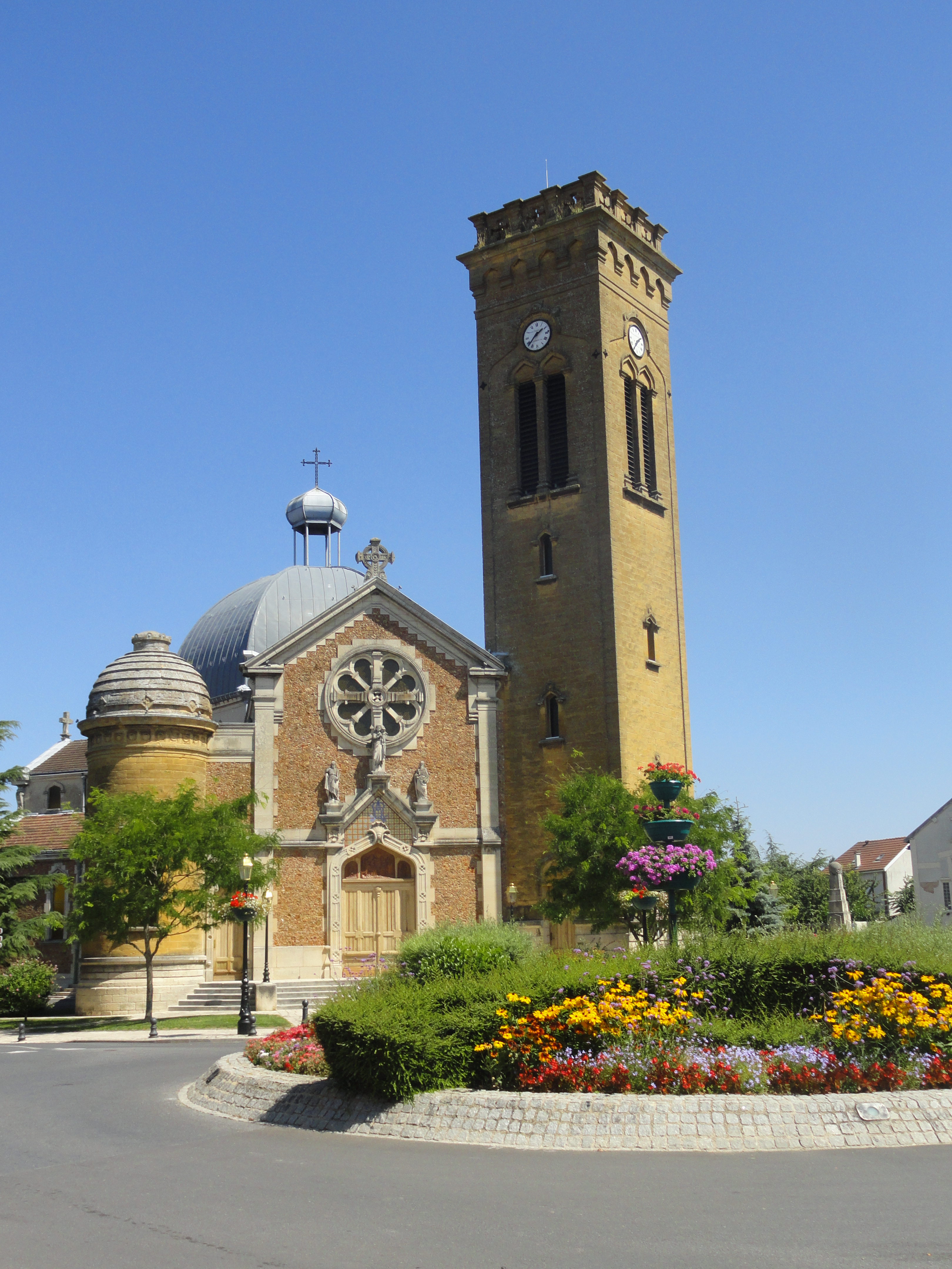 Façade de l'église Sainte-Marie de Magenta